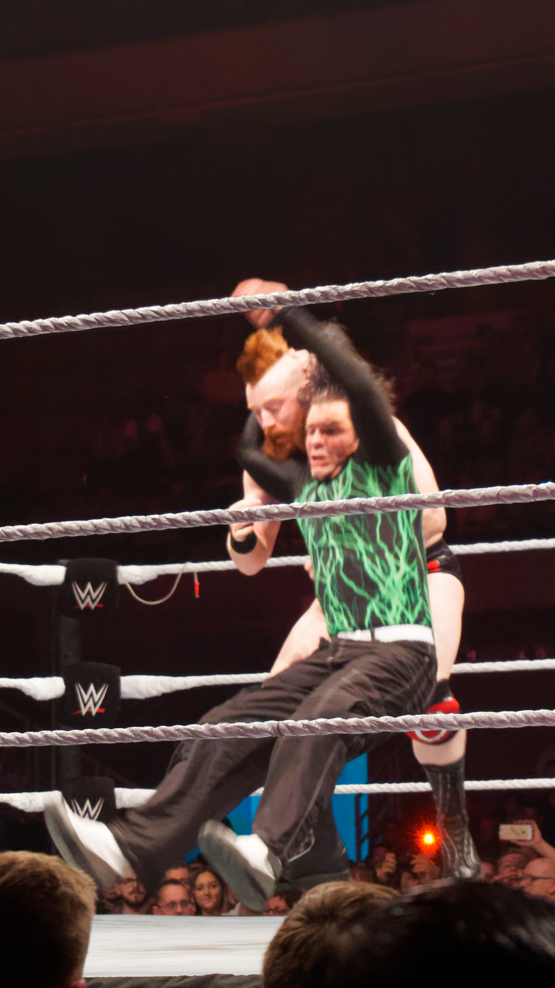 Jeff Hardy (c) & Matt Hardy (c) defeat Big Cass & Enzo Amore, Cesaro & Sheamus (in Triple Threat Match) Info on the match : WWE RAW Tag Team Title ( Le vendredi 12 mai, la WWE Live Tour fera escale au Country Hall a Liege pour le spectacle de catch de l'annee! Au programme: des duels impitoyables et des rencontres captivantes entre les meilleures equipes et les plus grands rivaux. )